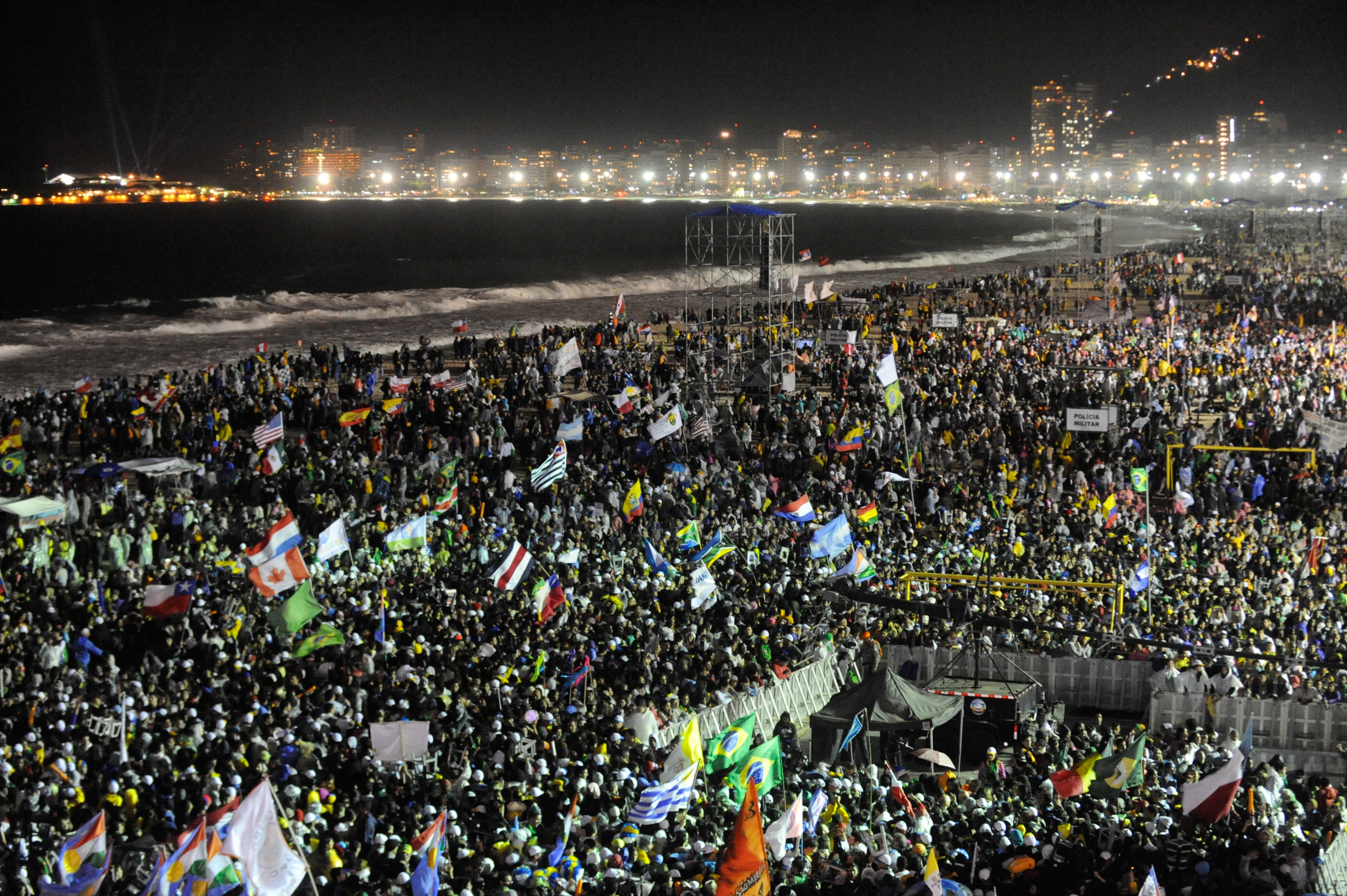 Rio de Janeiro – Festa da Acolhida, na orla de Copacabana